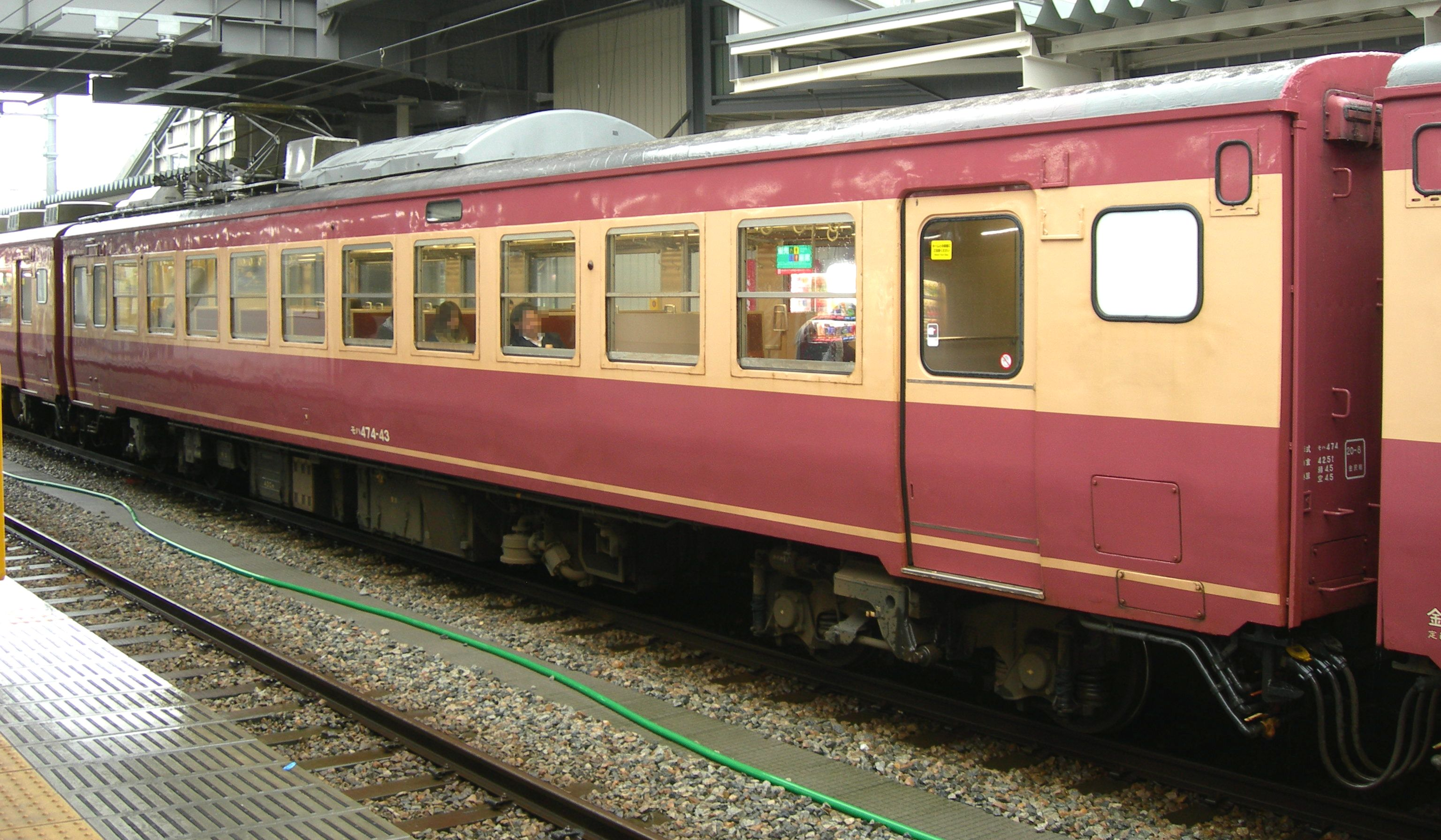 国鉄475系電車 モハ474